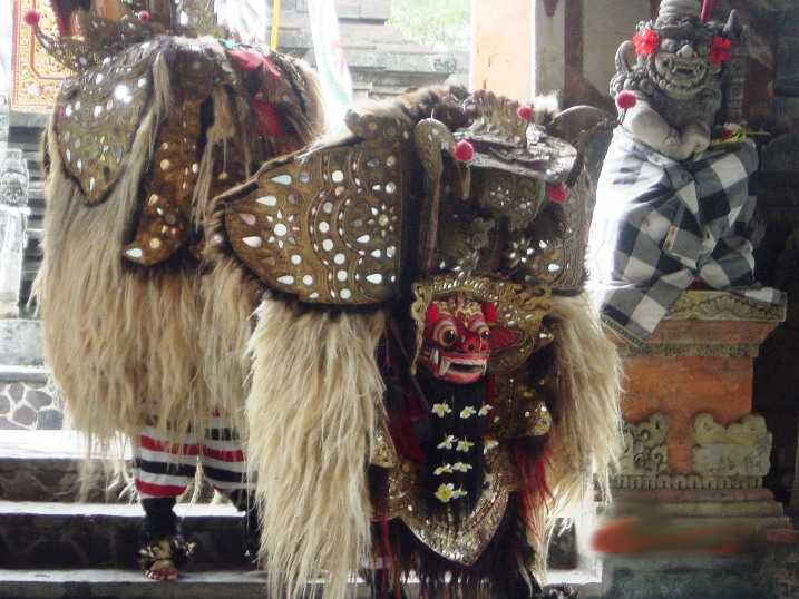 投稿者自身による撮影。 機材：SONY、P-100